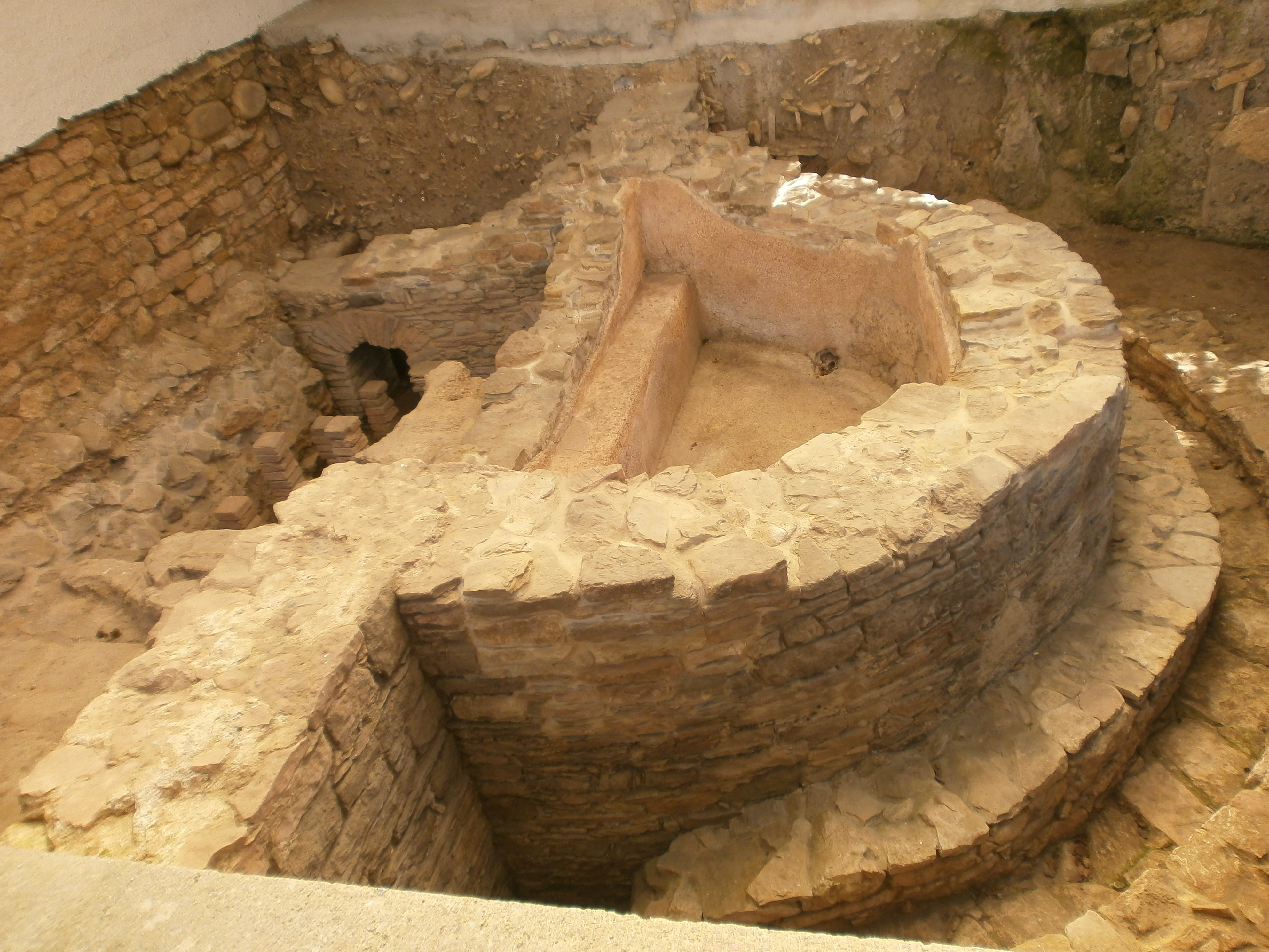 Termas romanas en Valduno, a unos 17-18 km de Oviedo por la N-634, entre Trubia y Grado.